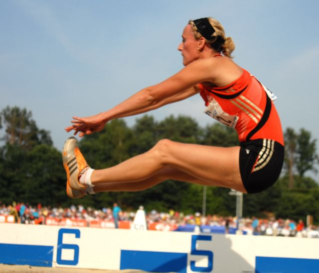 Laurien Hoos during Papendal Games 2007